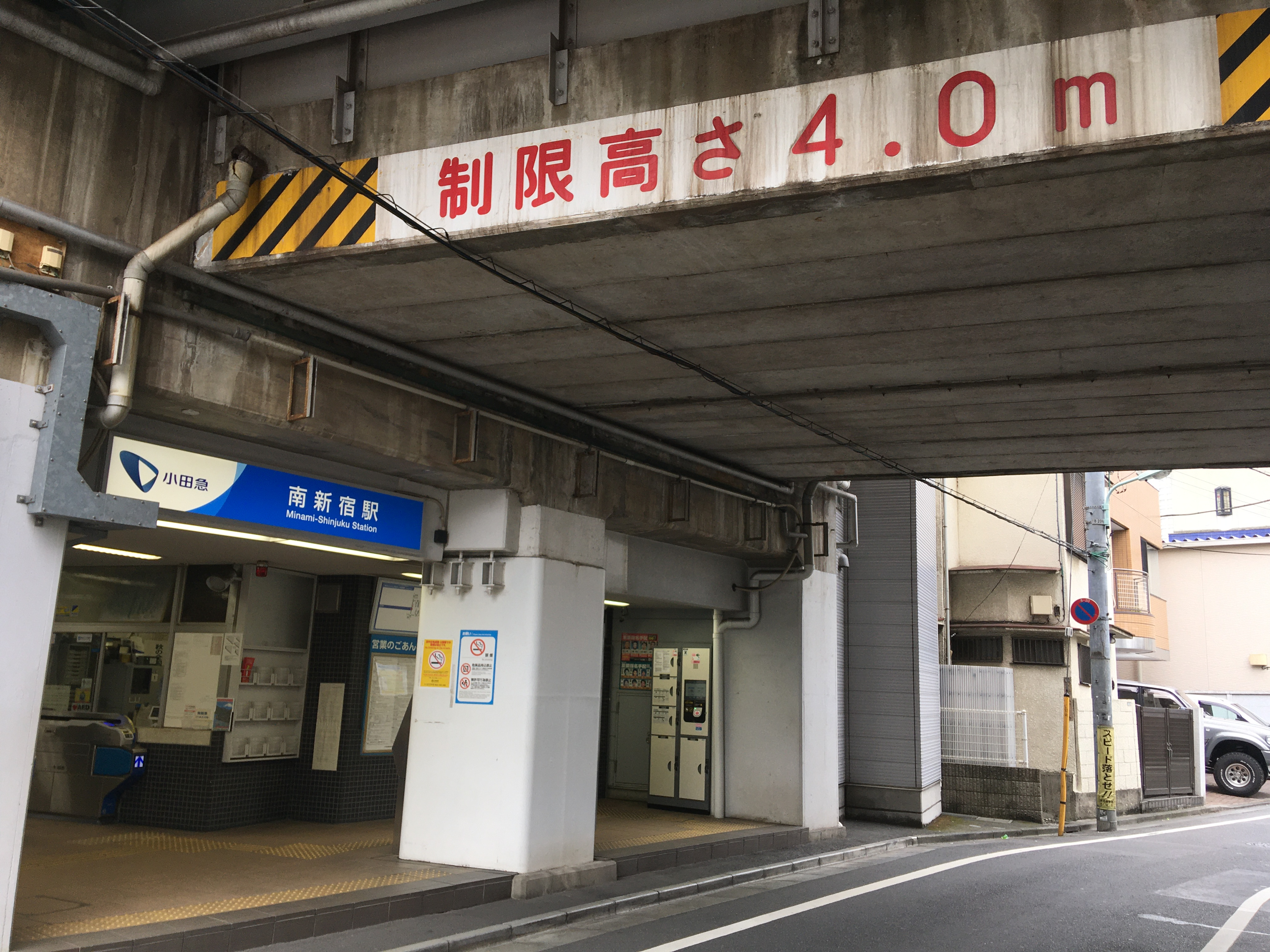 高架下にある駅入口